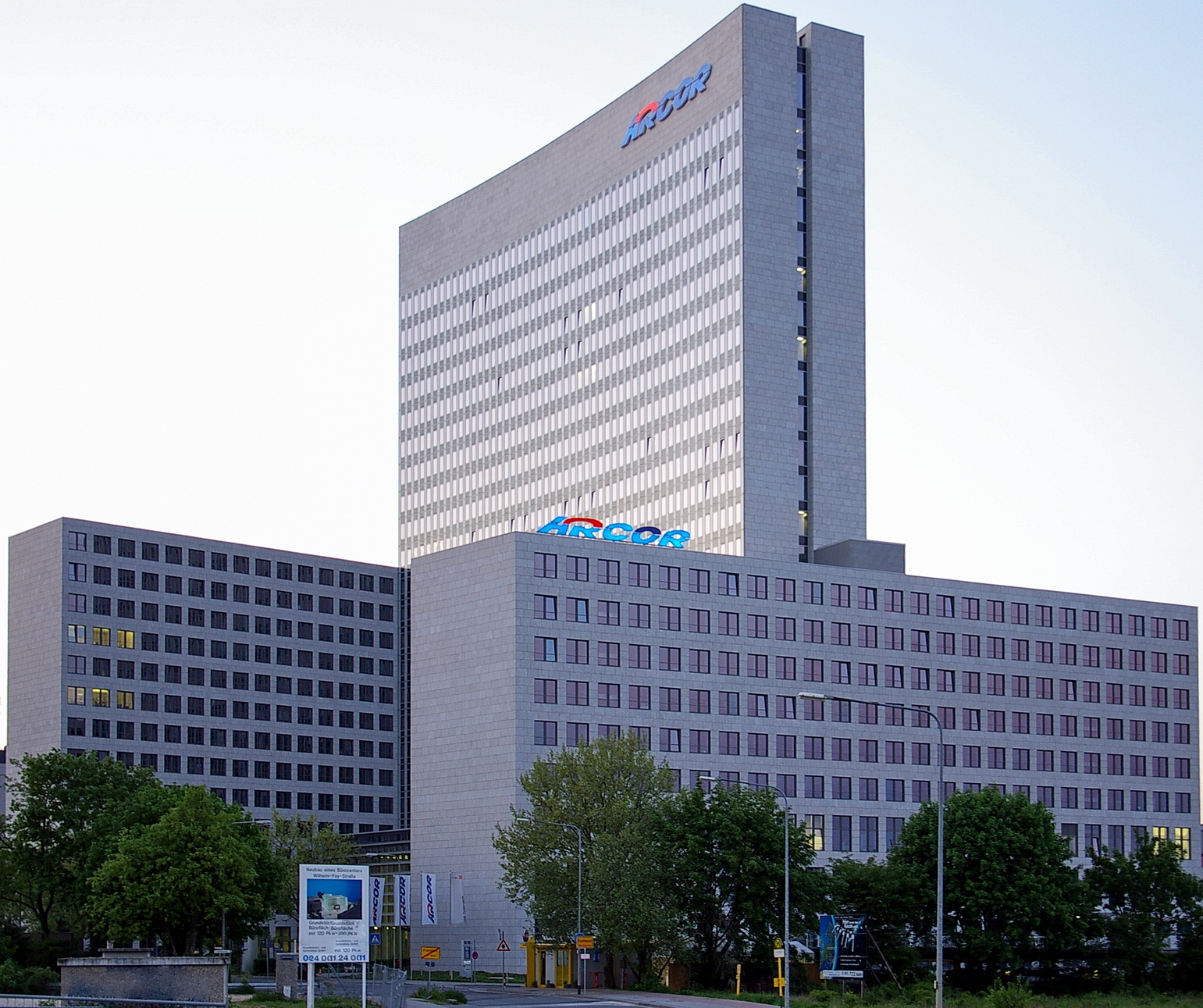 Arcor Zentrale in Eschborn in Gewerbegebiet Süd, Alfred-Herrhausen-Allee